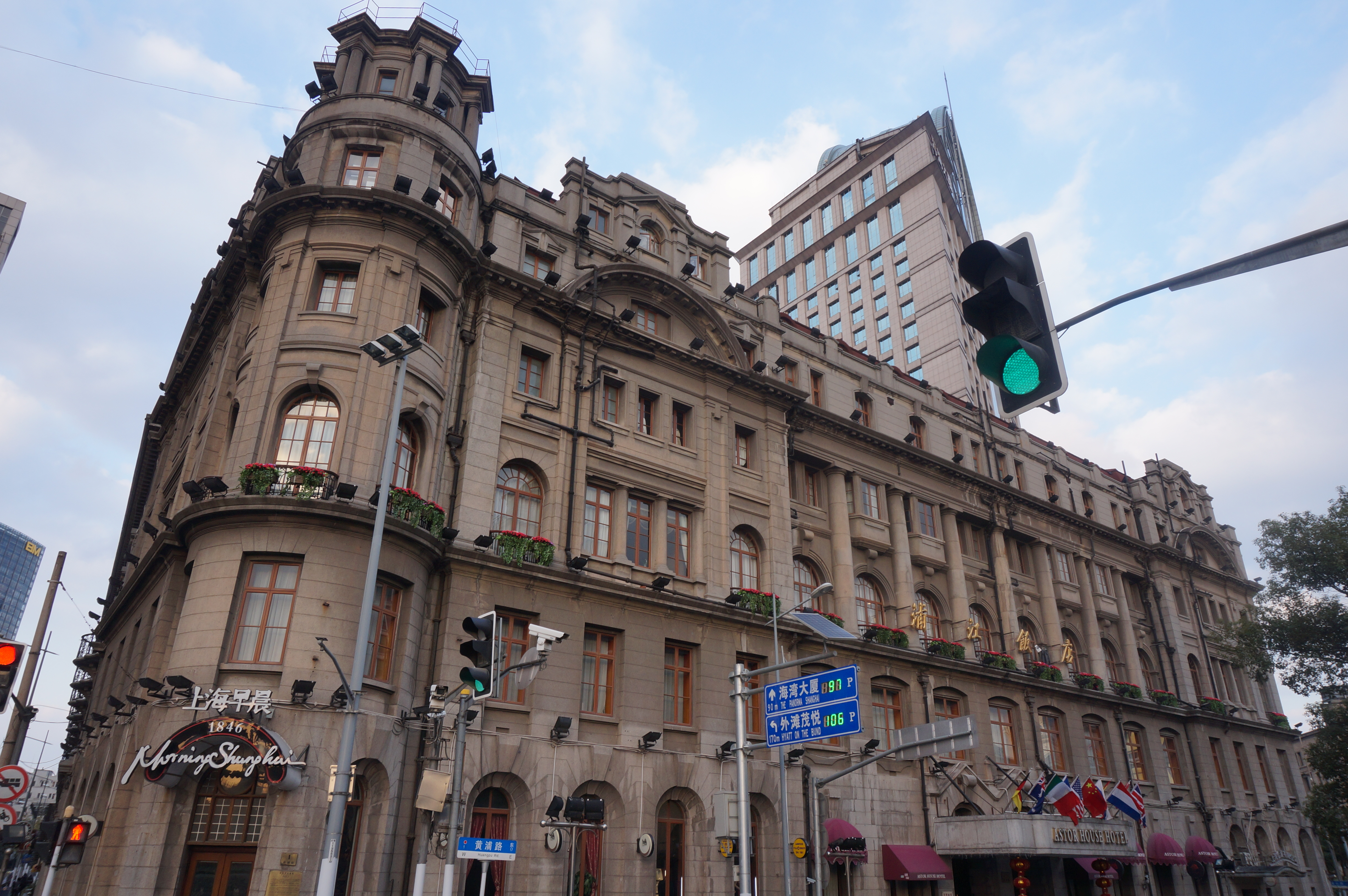 中文（中国大陆）: 上海浦江饭店